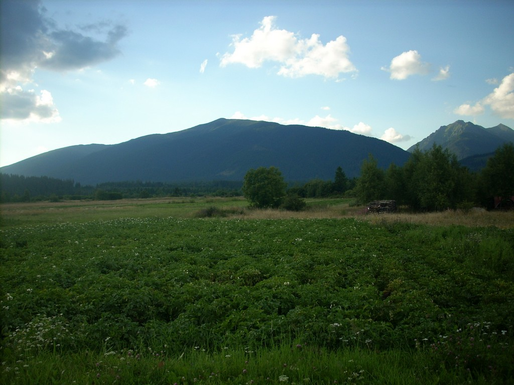 Mládky z Liptovskej kotliny